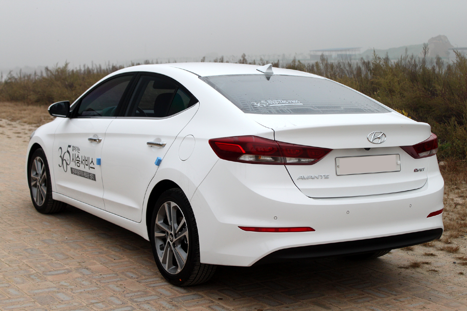 현대 아반떼(AD) 후측면